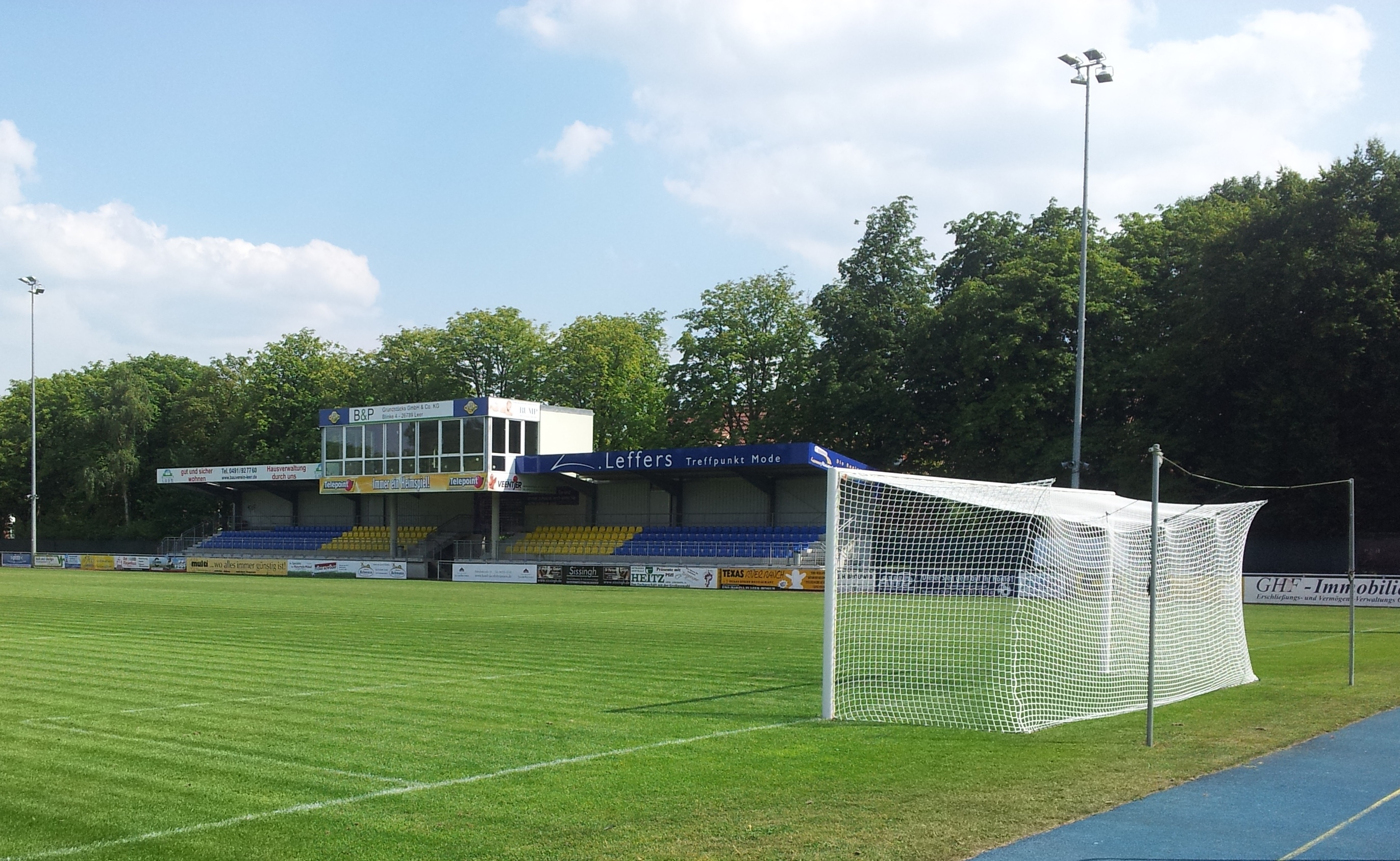 Haupttribüne im Hoheellernstadion